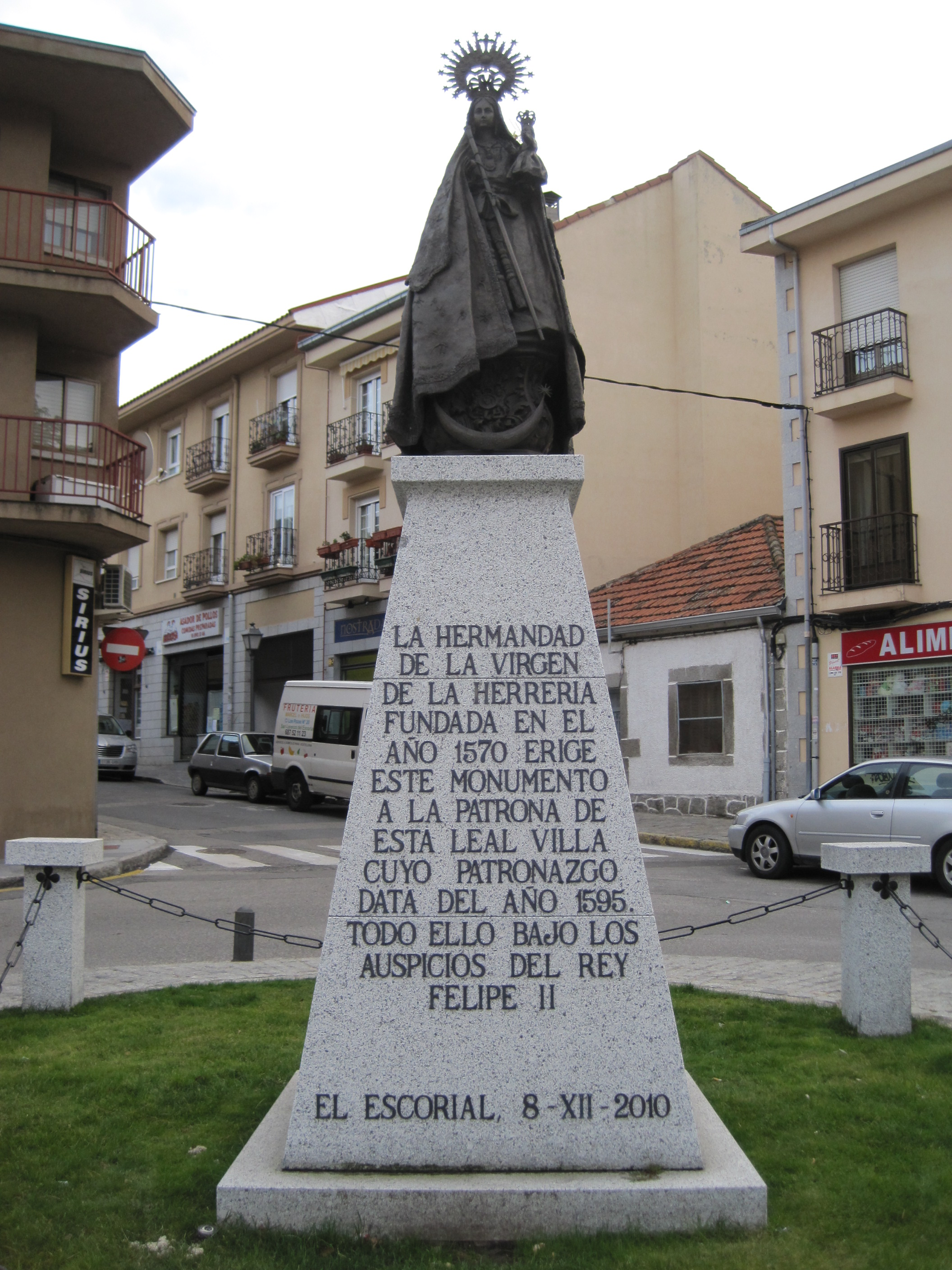 Monumento a la Virgen de la Herrería, en El Escorial (Madrid, España).